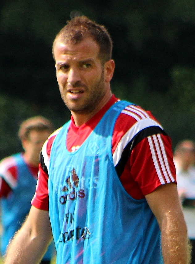 Rafael van der Vaart beim HSV-Training am 14. August 2014.